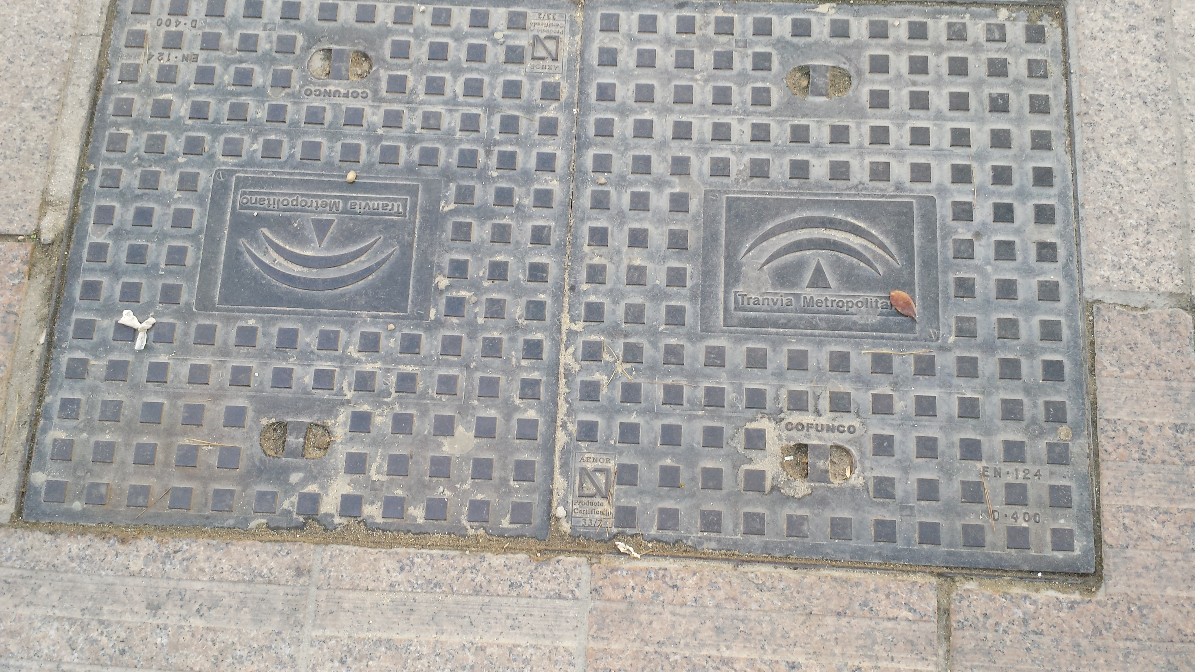 tranvía metropolitano San Fernando Cádiz